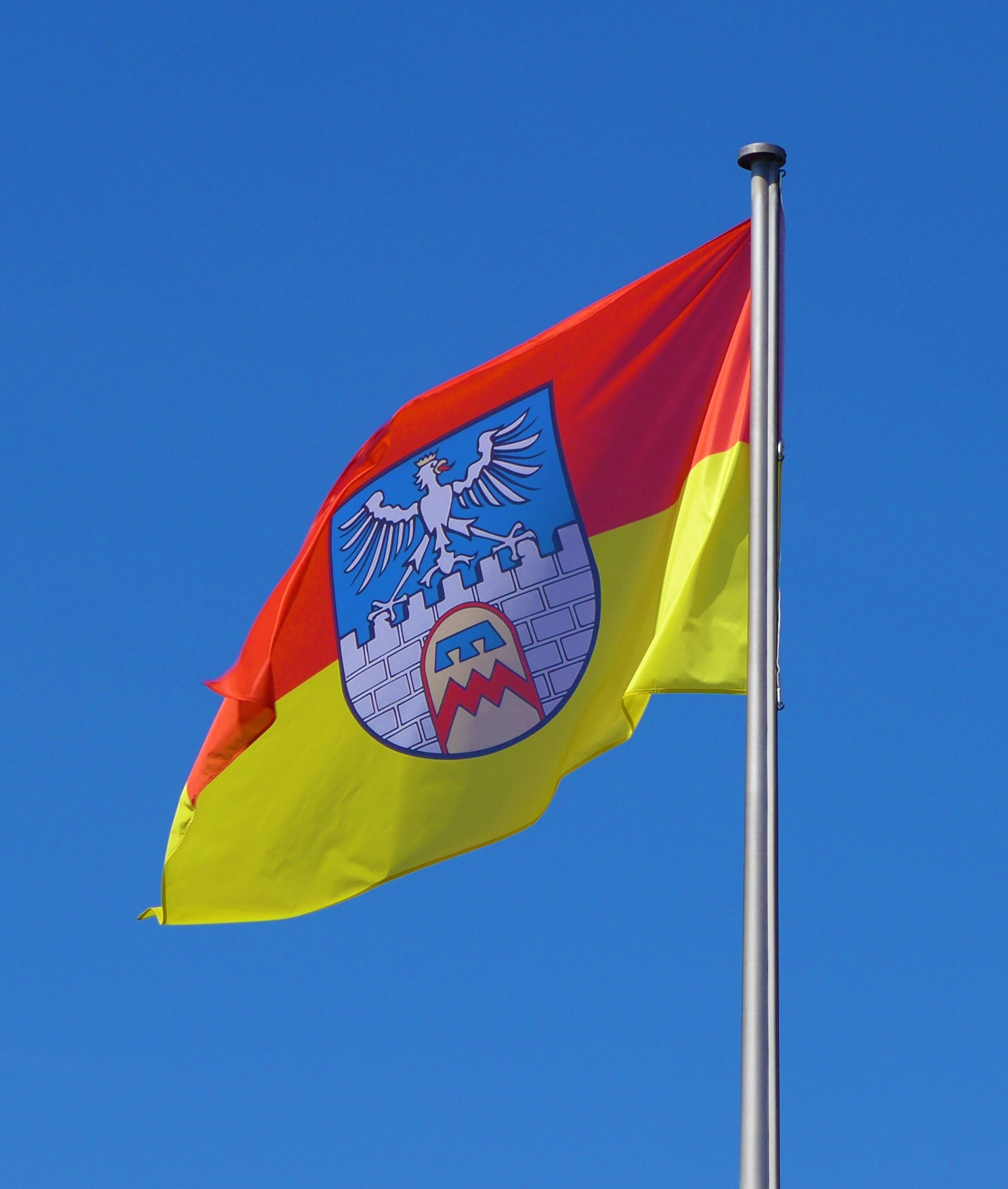 Stadtflagge Dillingen / Saar; Wappenfarben rot-Gold